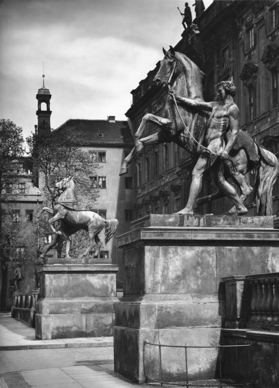 Berlin; Rossebändiger; Plastik vor dem Berliner Schloss 1933